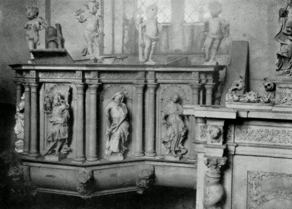 St.-Marien-Kirche Boizenburg, Barockkanzel, vor 1900